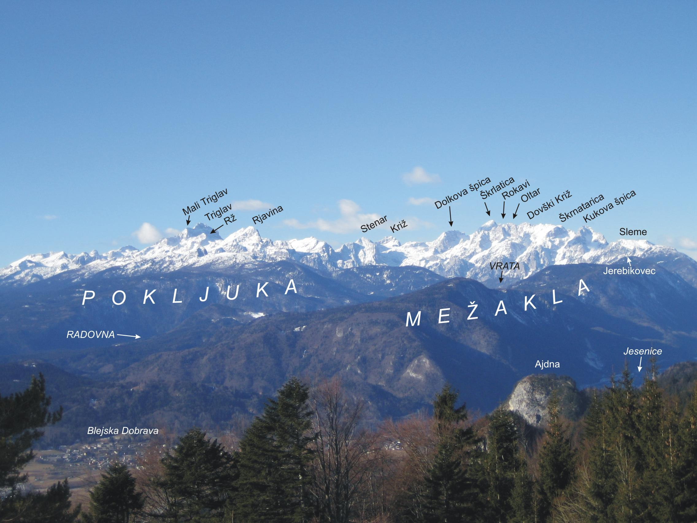 Vzhodni Julijci z dodanimi imeni gora.